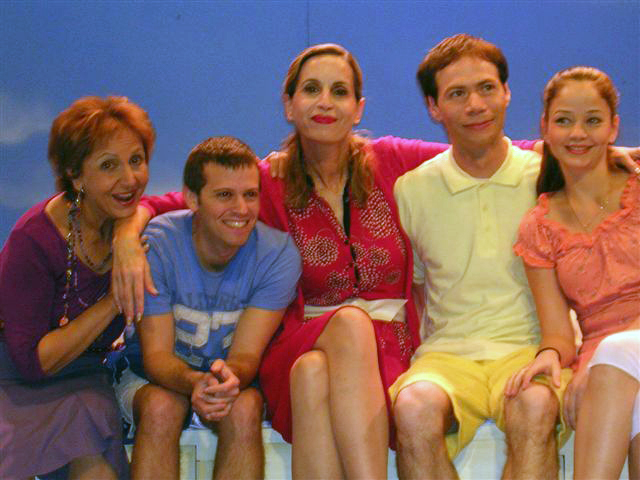 עידית טפרסון במרכז, שושה גורן משמאל)